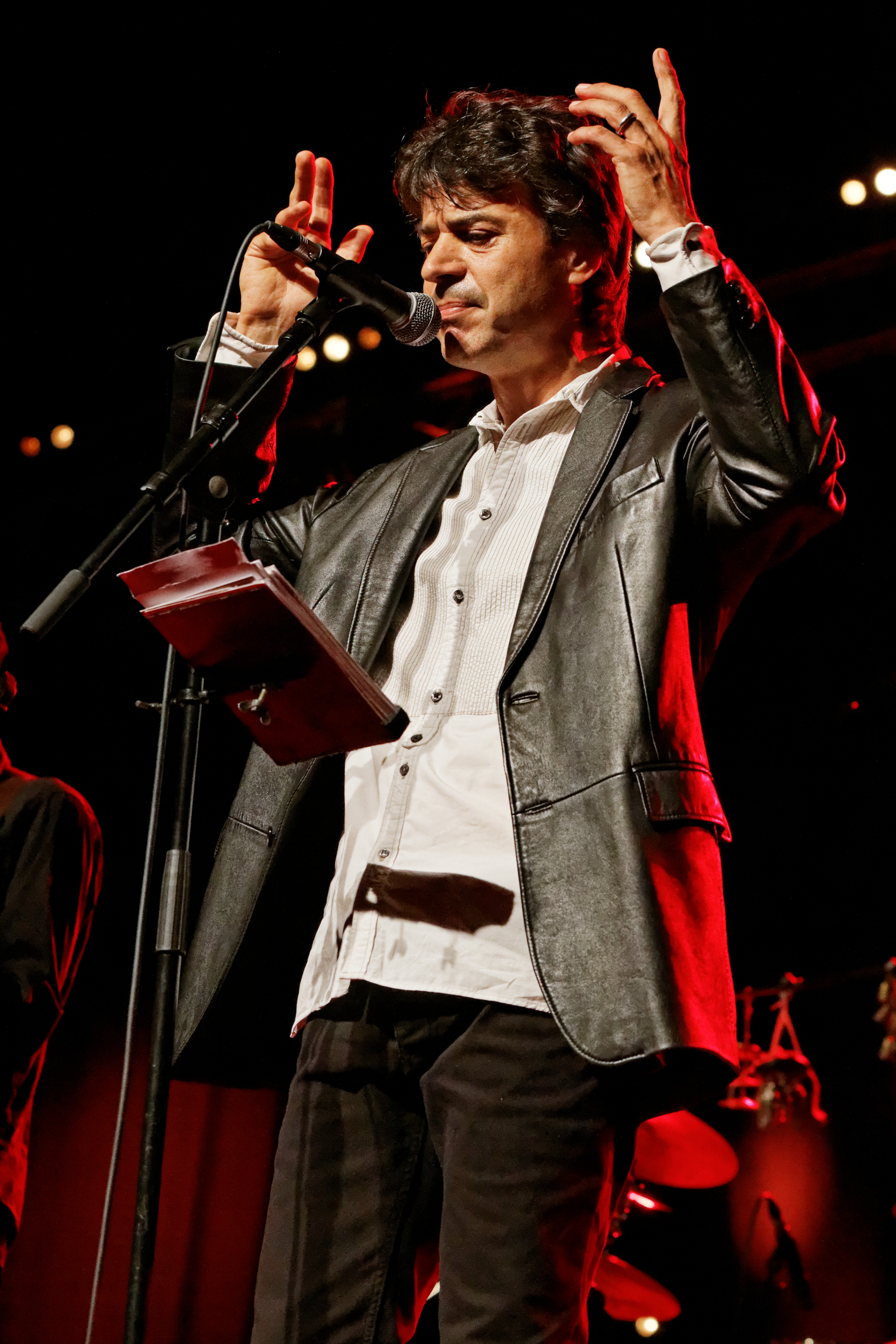 Denez Prigent en concert sur la scène Gradlon lors du festival de Cornouaille 2014.